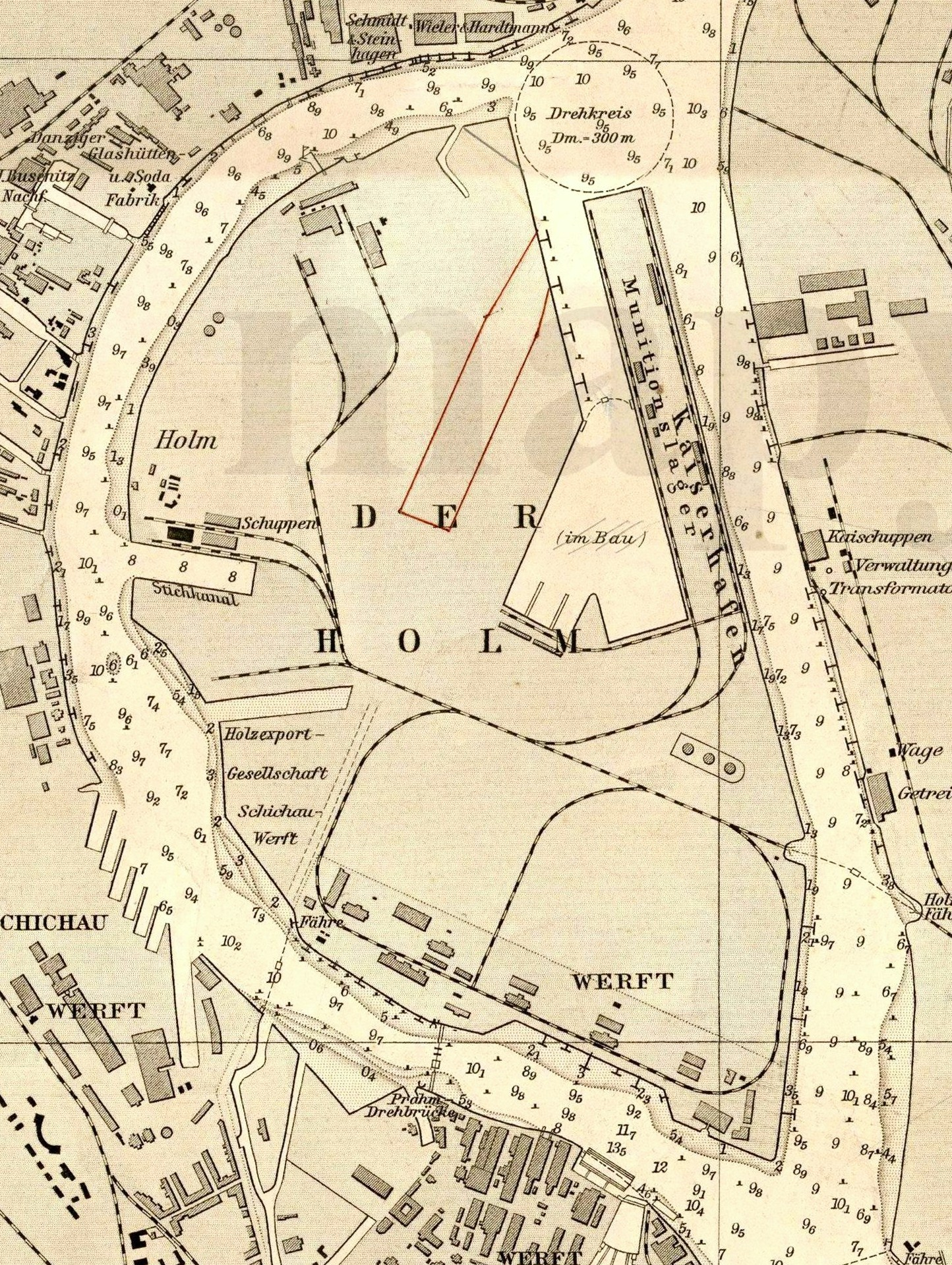 Gdańsk Młyniska, wyspa Ostrów. Po prawej Kanał Kaszubski.